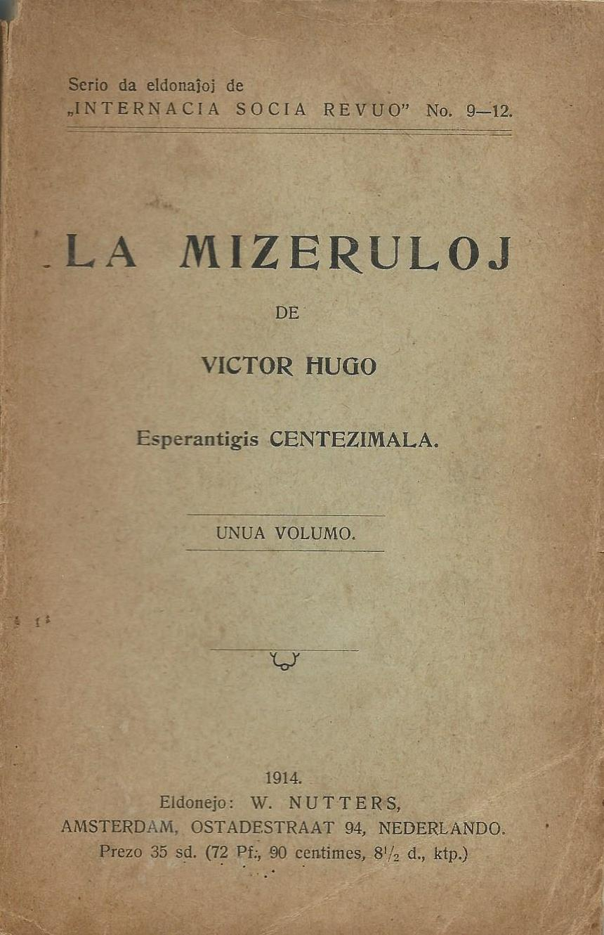 librokovrilo de libro "La Mizeruloj", 1914